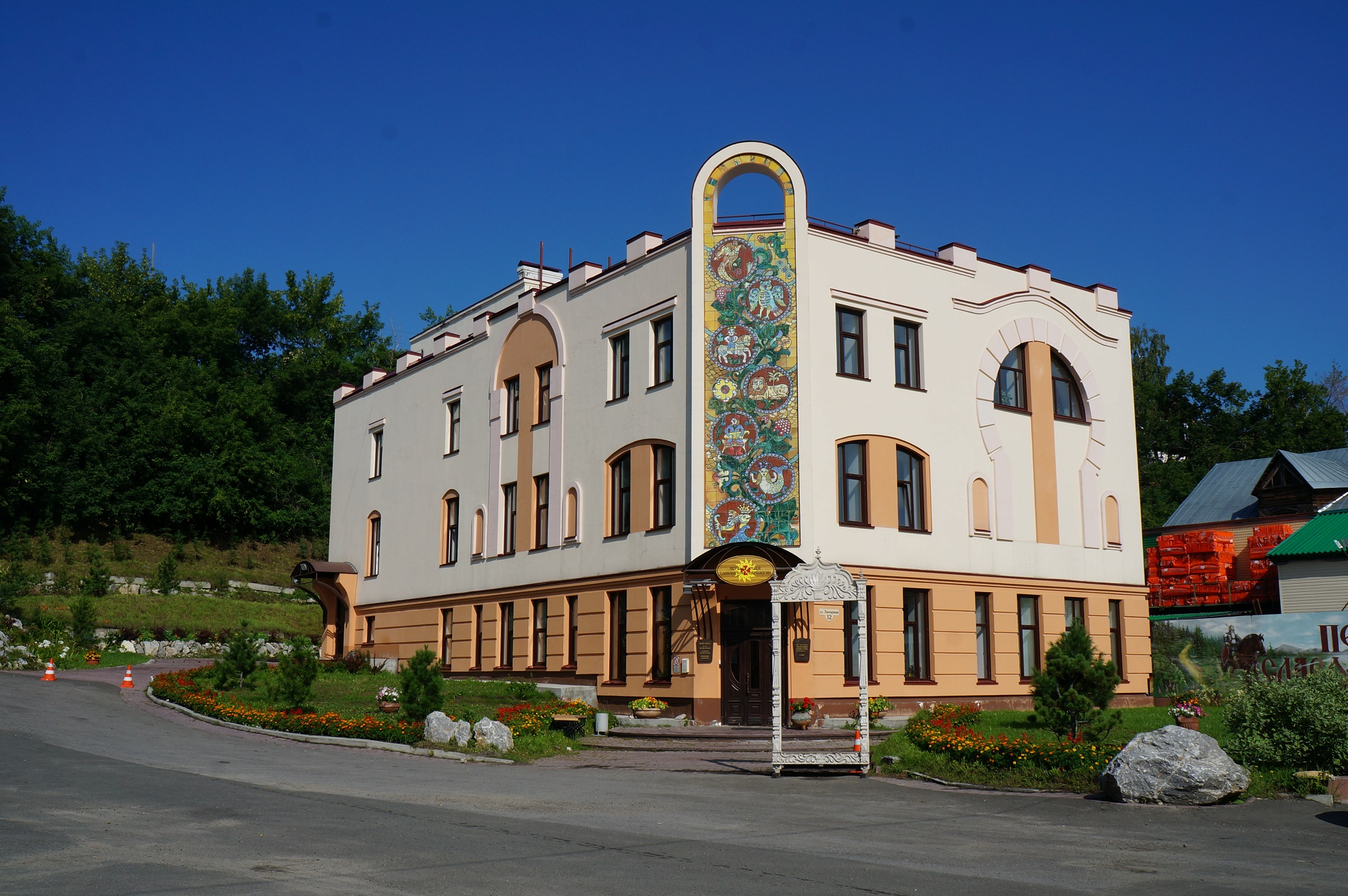 Первый музей славянской мифологии